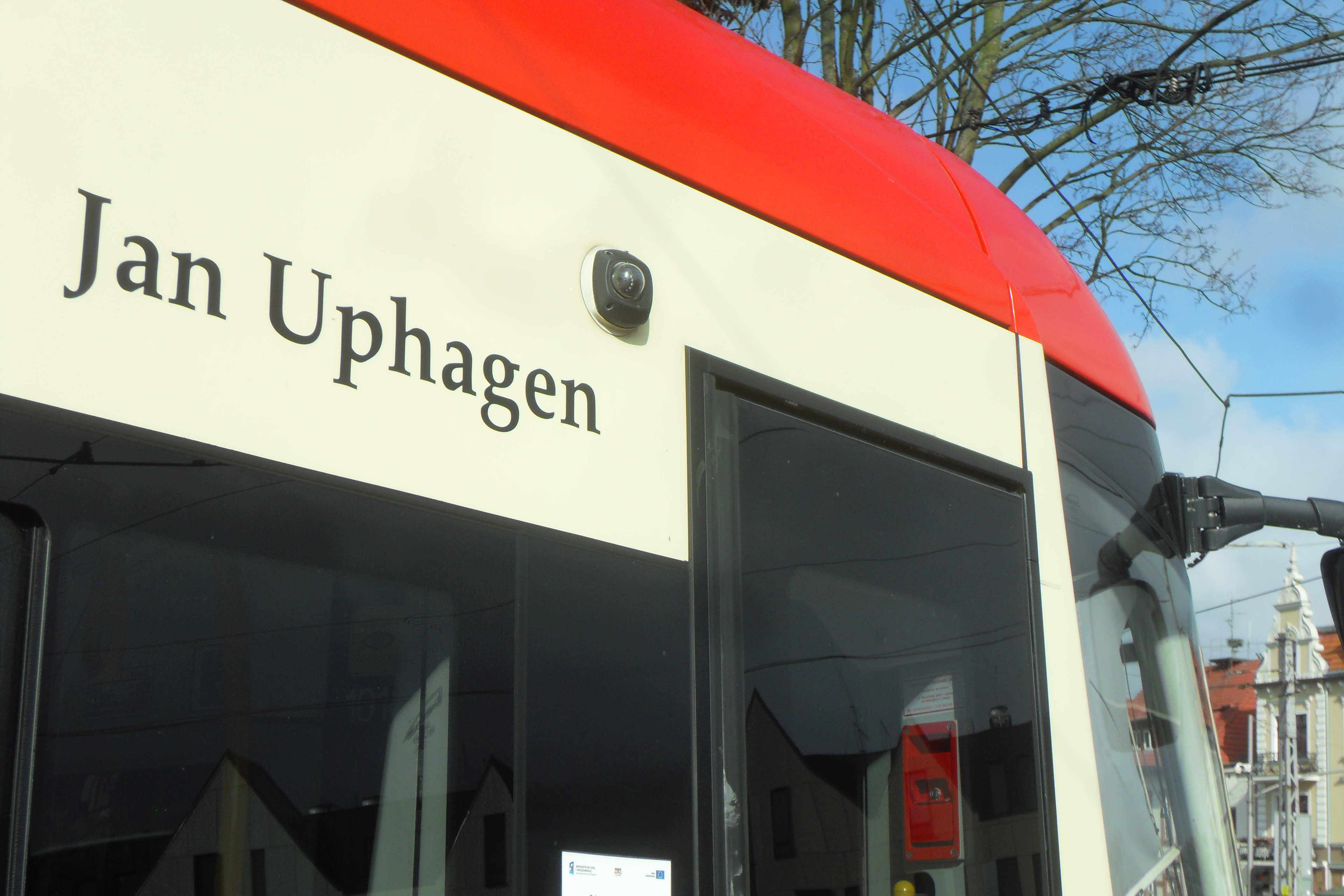 Gdańsk Oliwa, tramwaj Pesa Swing 120NaG nr 1014, którego patronem jest gdańszczanin Jan Uphagen (1731-1802).